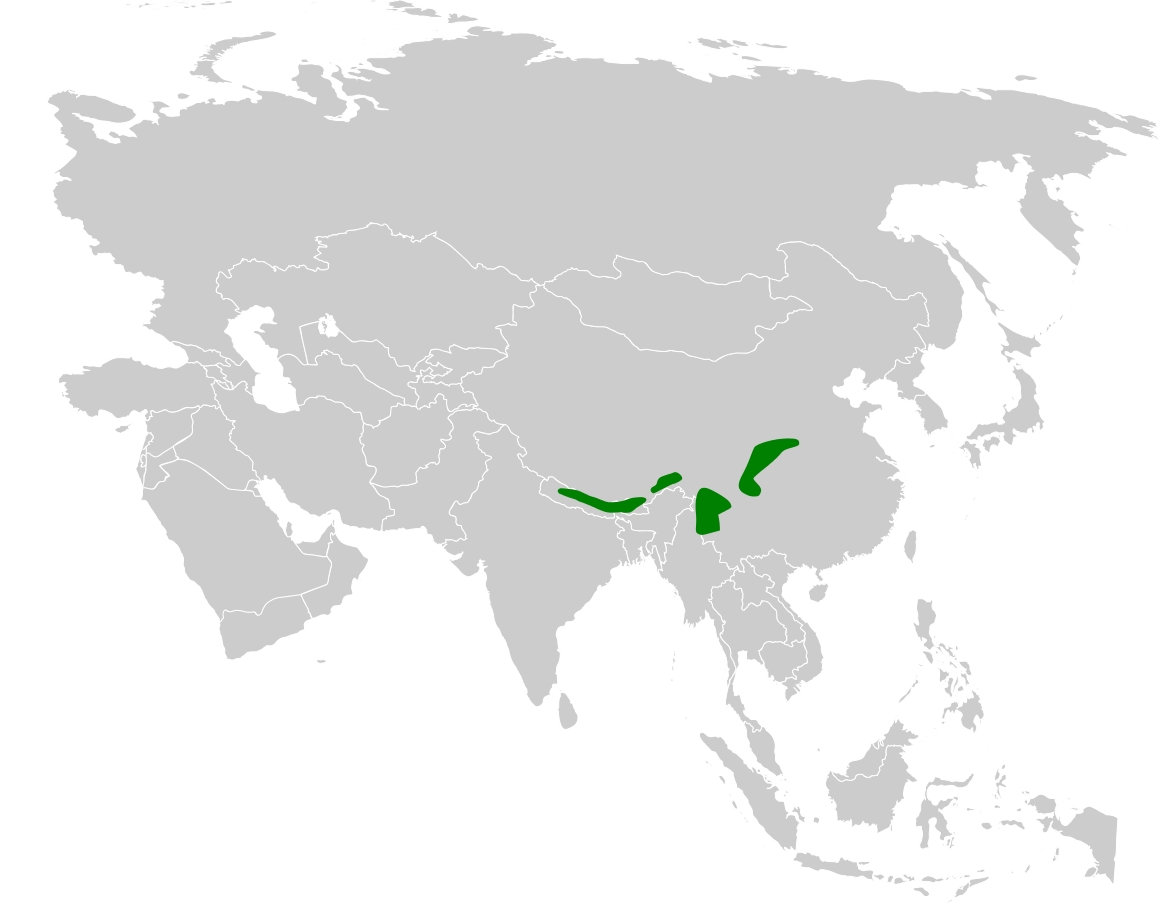 Suthora fulvifrons distribution map